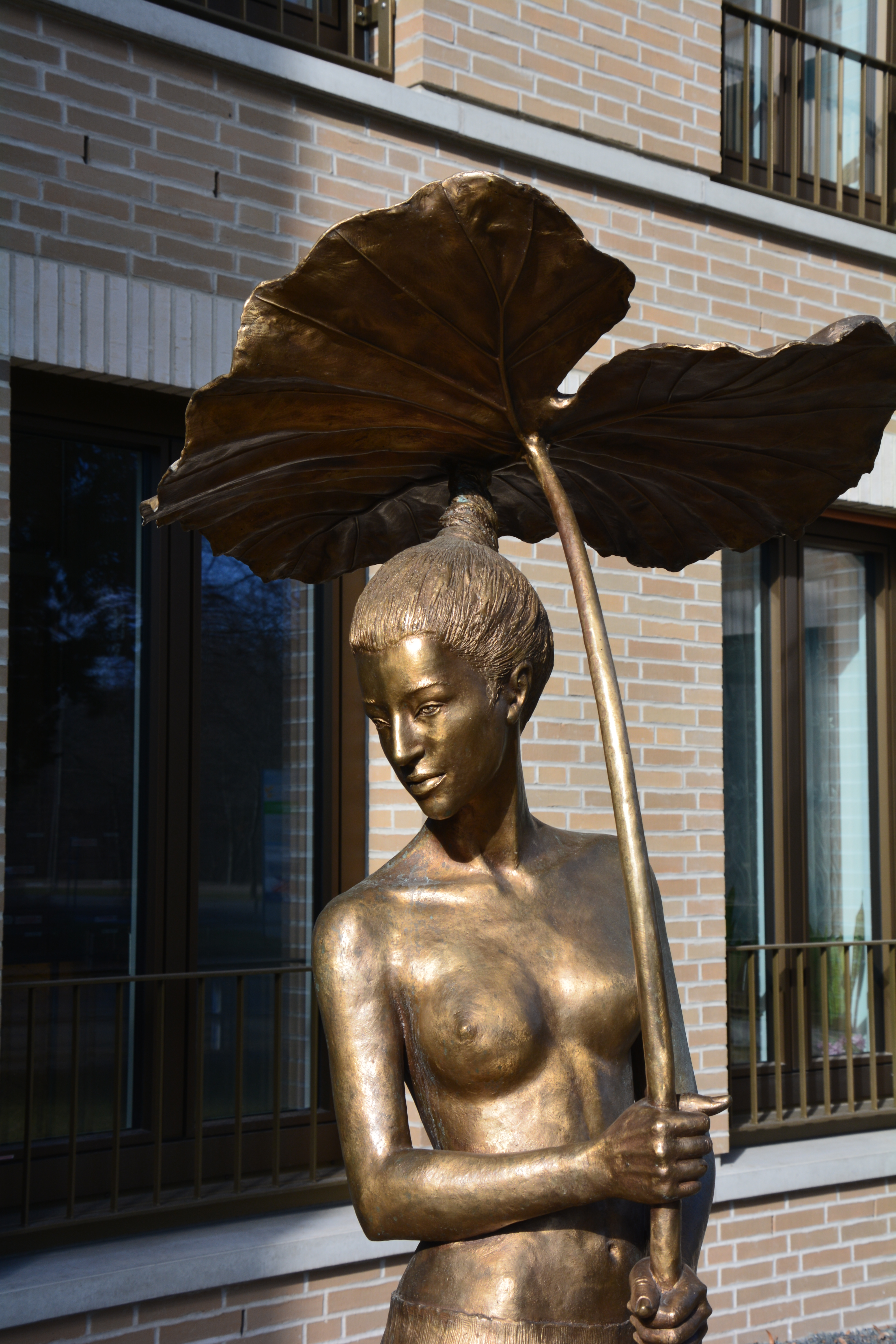 Dresden, Brunnenfigur: Mädchen mit Blatt von der Dresdner Bildhauerin Małgorzata Chodakowska, Franz-Liszt-Straße 2